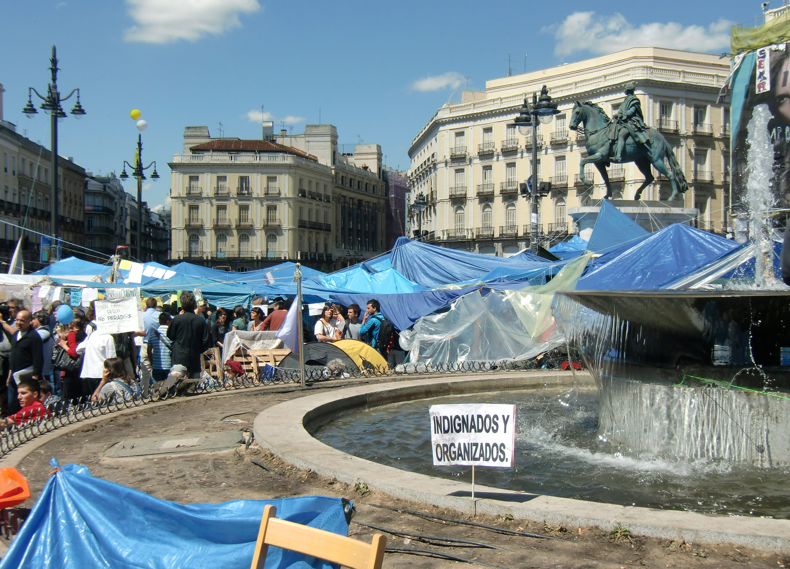 Madrid, Puerta del Sol. Revuelta popular a favor de la democracia.